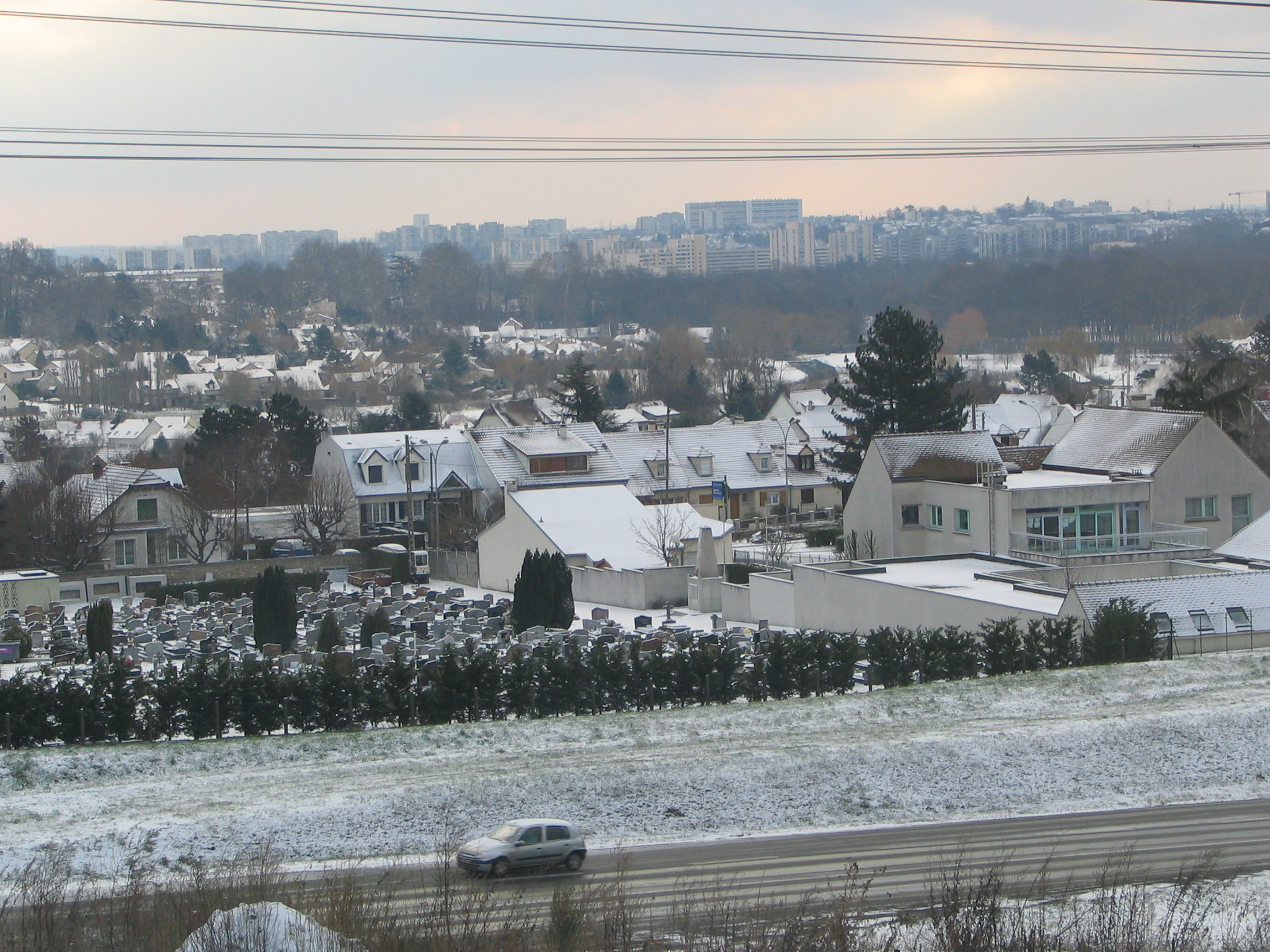 Igny centre sous la neige. au premier plan la N444 et derrière, le cimetière et le centre de l'enfance F. Dolto.